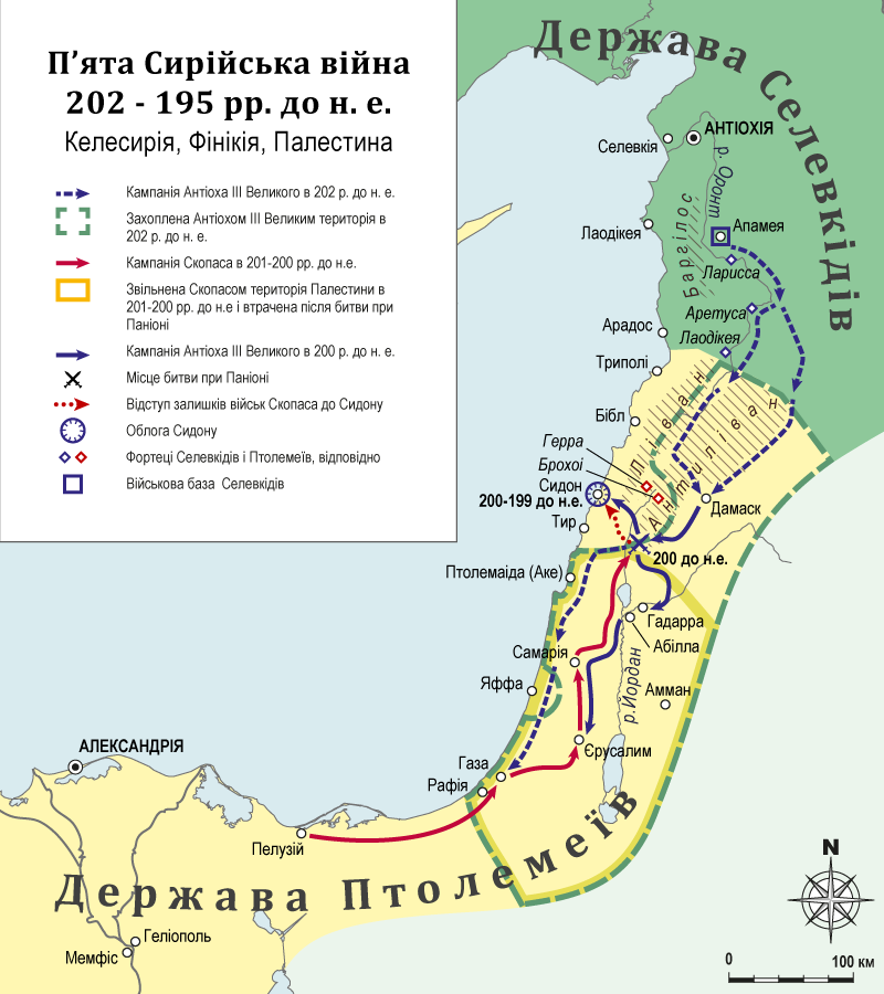 Кампанії в Келесирії під час П'ятої Сирійської війни. На основі John D. Grainger (2010), The Syrian Wars.